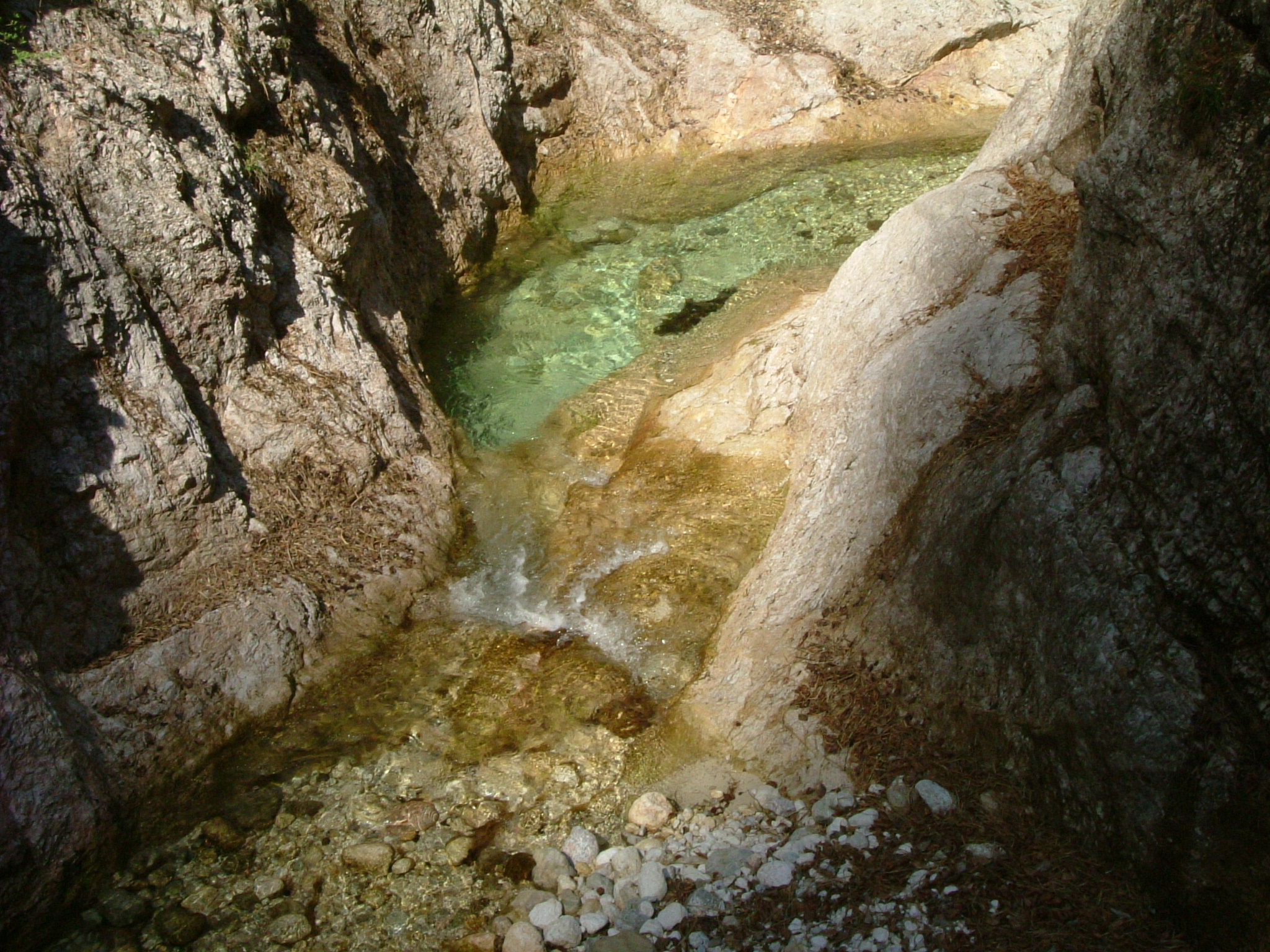 Almbachklamm (mittlerer Abschnitt), Berchtesgadener Land